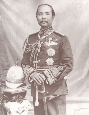 King Chulalongkorn of Siam